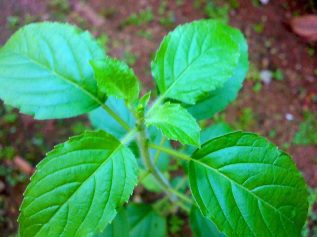 Ocimum tenuiflorum